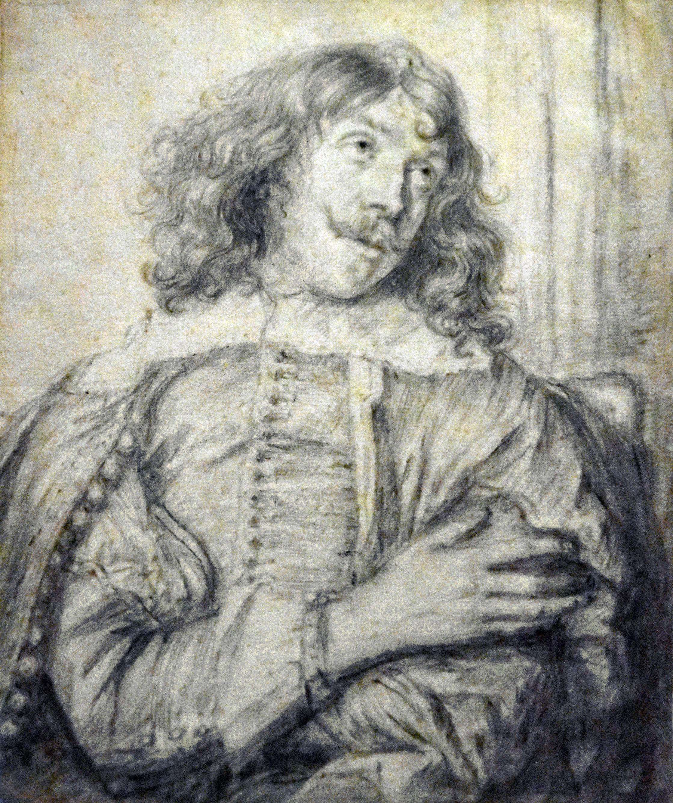 Jan Lievens (1607-1674) Portret van Adriaen Brouwer (ca.1640 krijt op papier) MOU Oudenaarde 13-12-2018